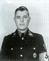 SS-Hauptsturmführer## Adam Grünewald